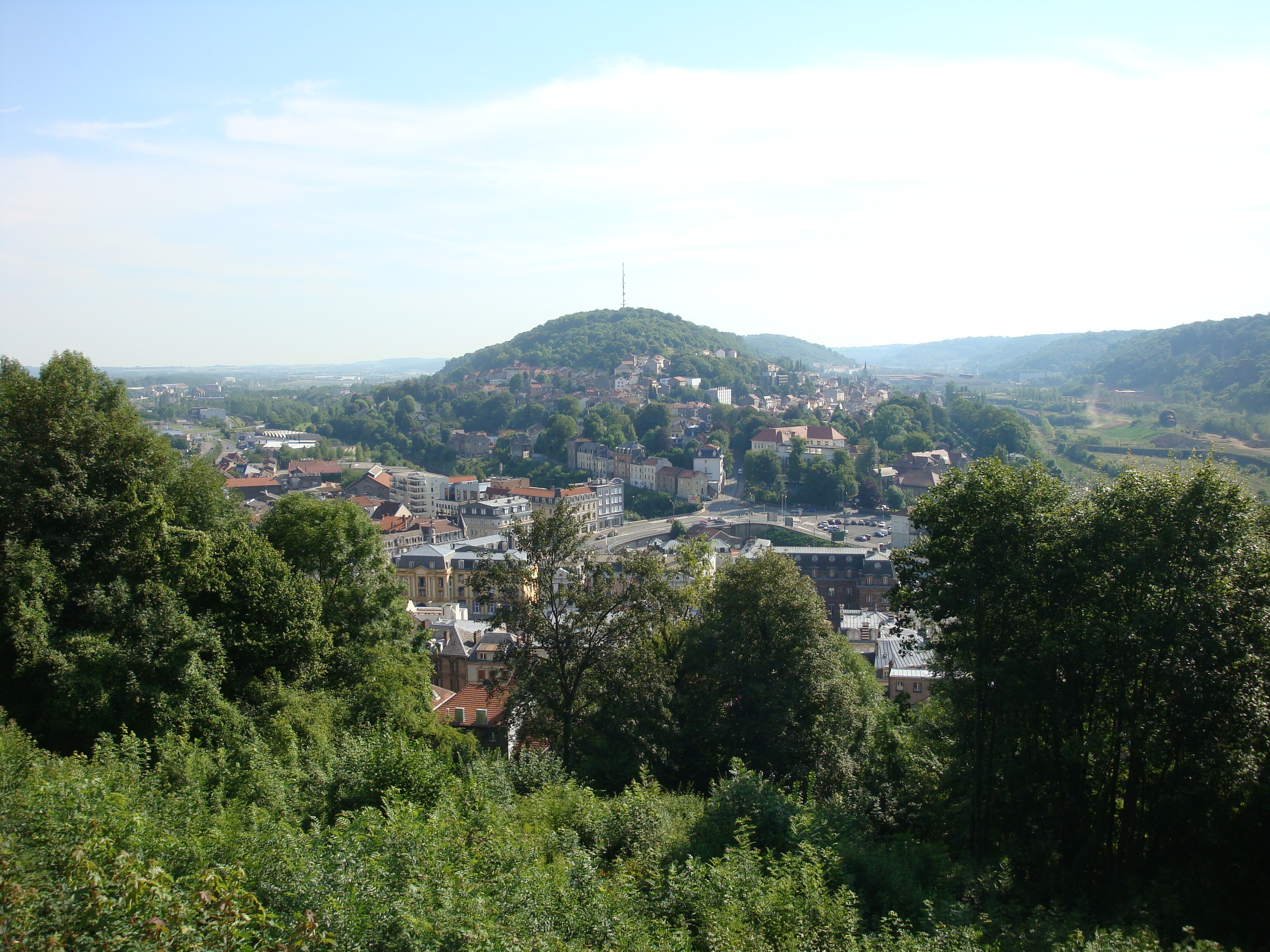 Vue du belvédère de Longwy sur Longwy-Bas et Herserange (54).